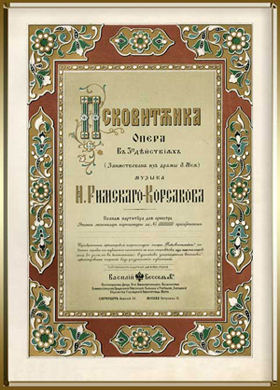 Обложка партитуры изд. Бесселя